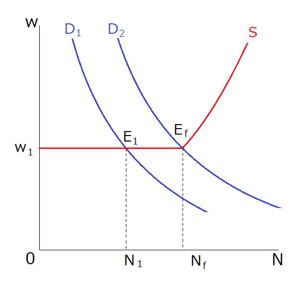 非自発的失業を図で示したもの。